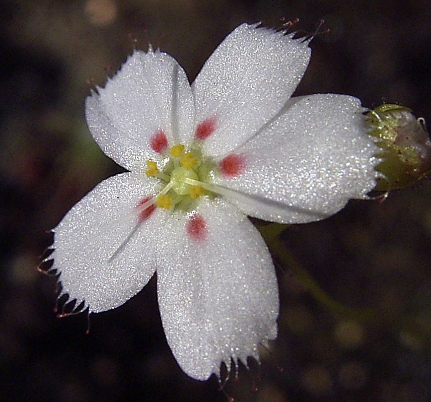 Drosera eneabba flora